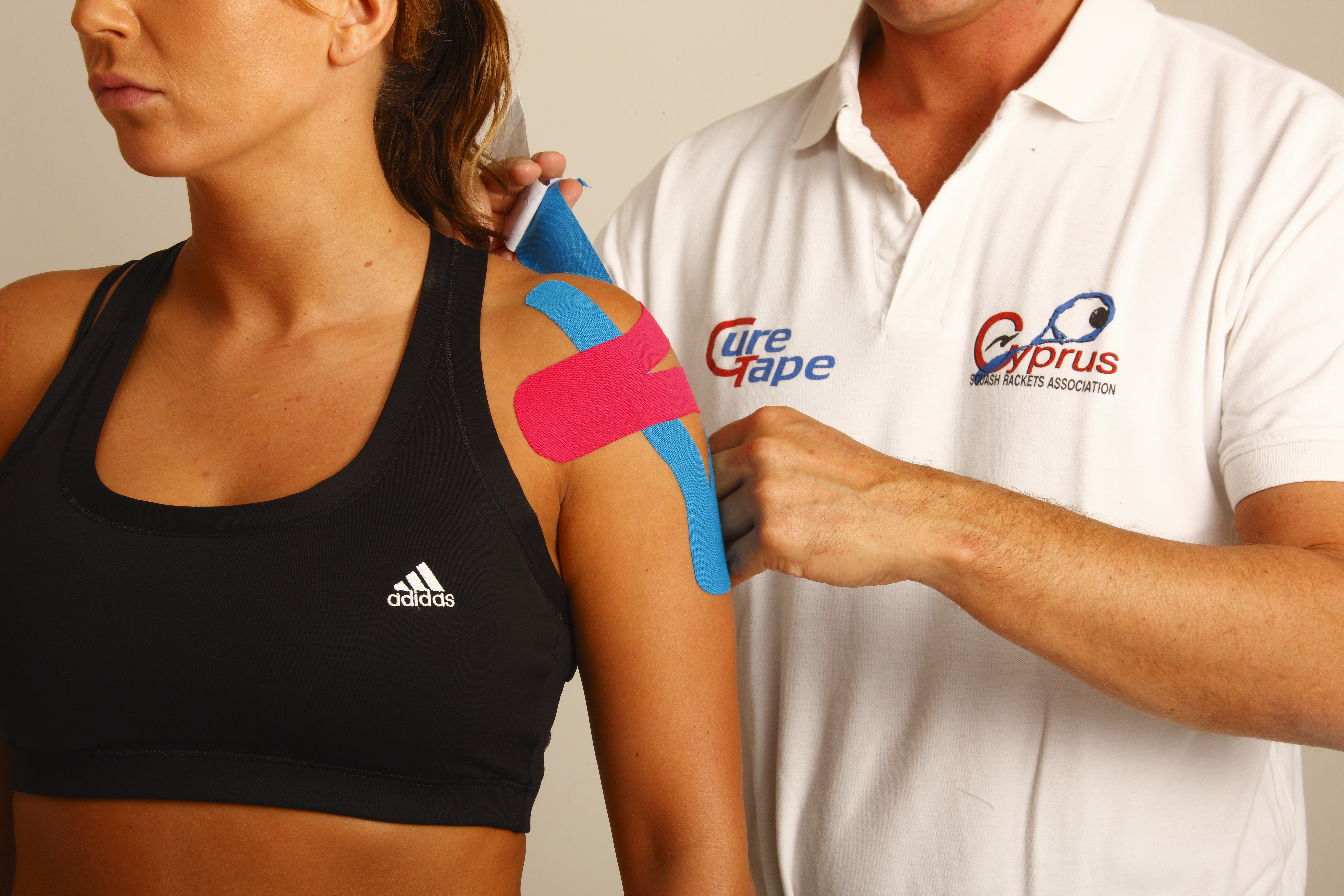 bandas neuromusculares